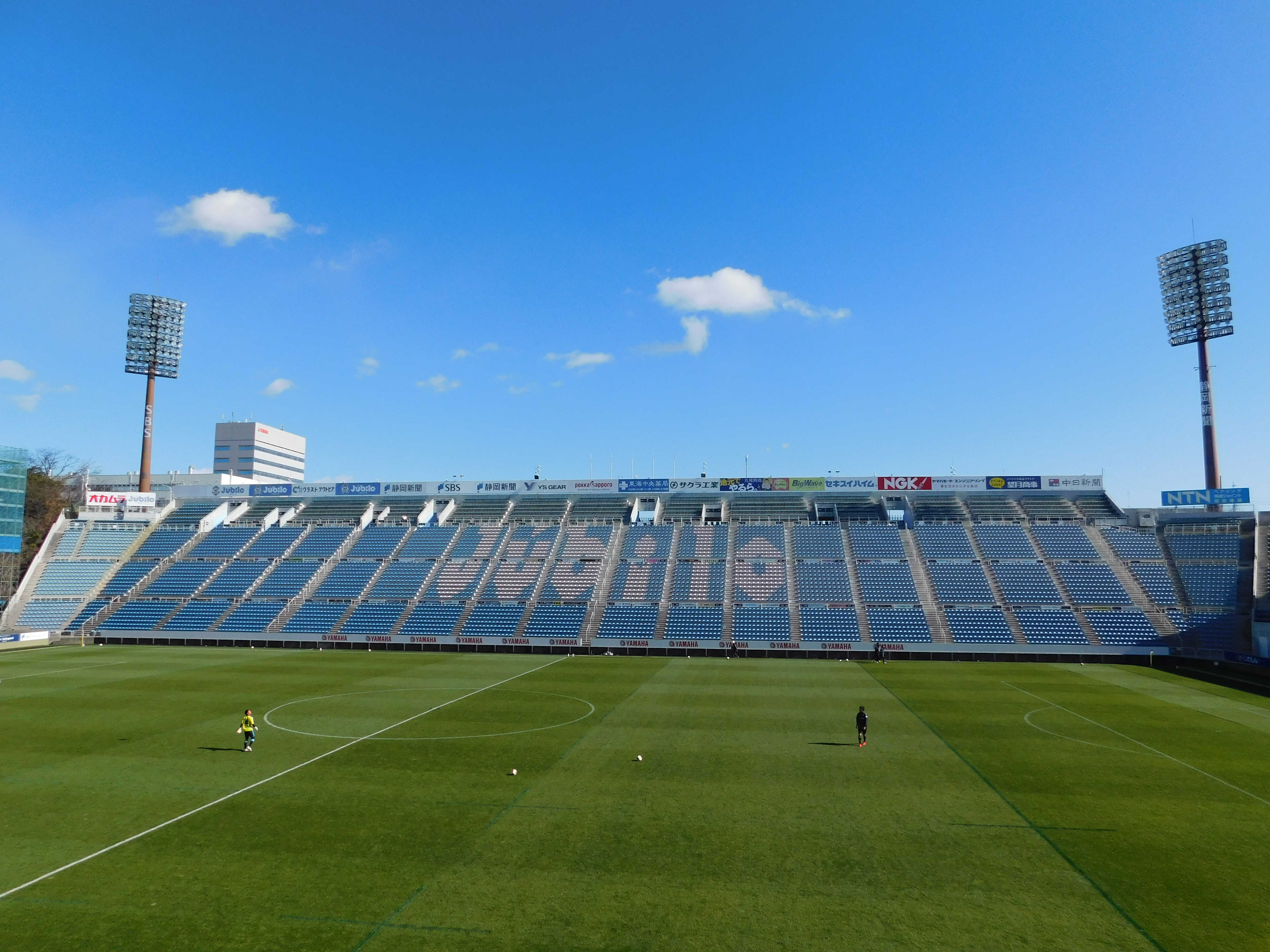 2017年1月24日 ヤマハスタジアムバックスタンドの写真。メインスタンドより撮影。